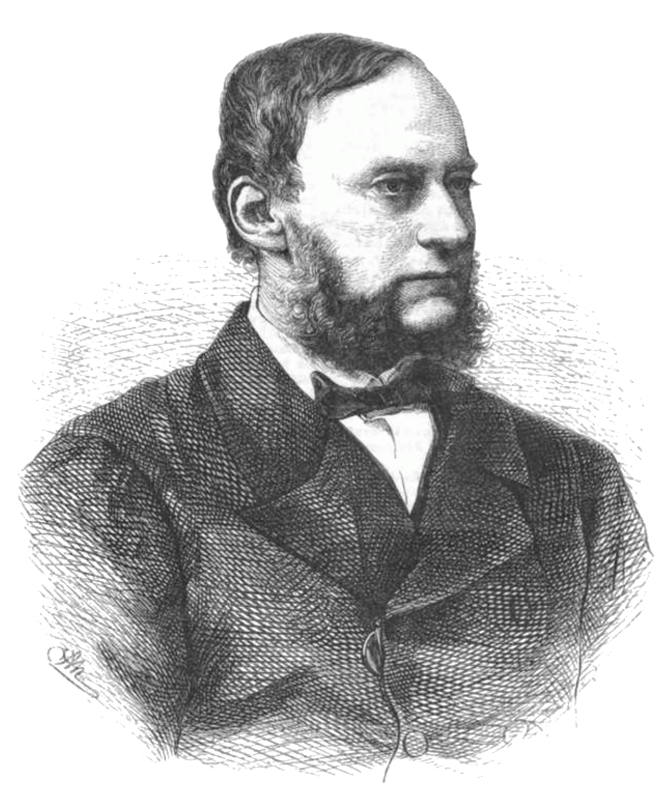 „Johann Graf Larisch, k. k. österreichischer Finanzminister“Johann Graf Larisch von Moennich (1821-1884) Austrian politician